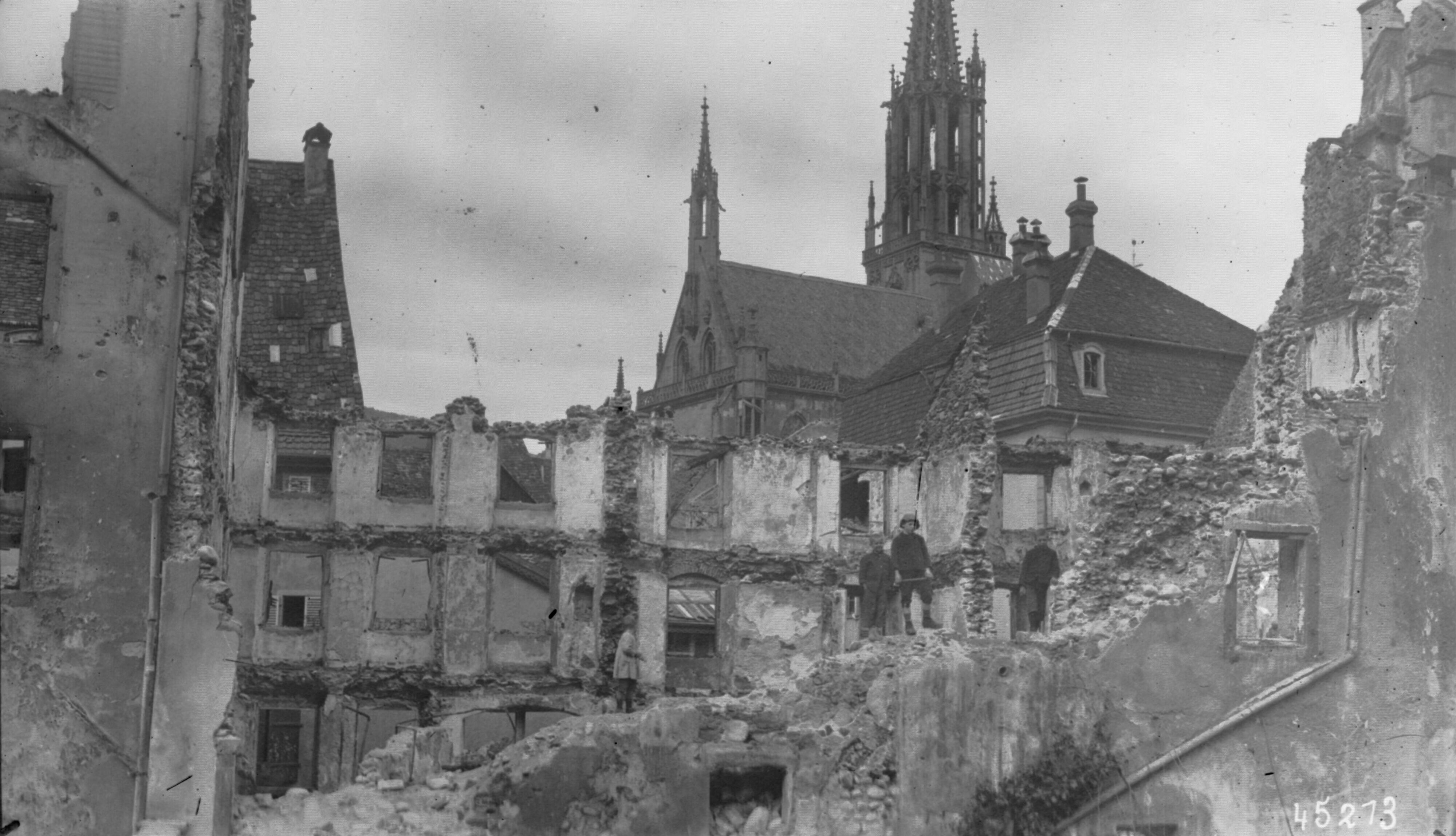 Thann, vue de bâtiments bombardés (photographie de presse)